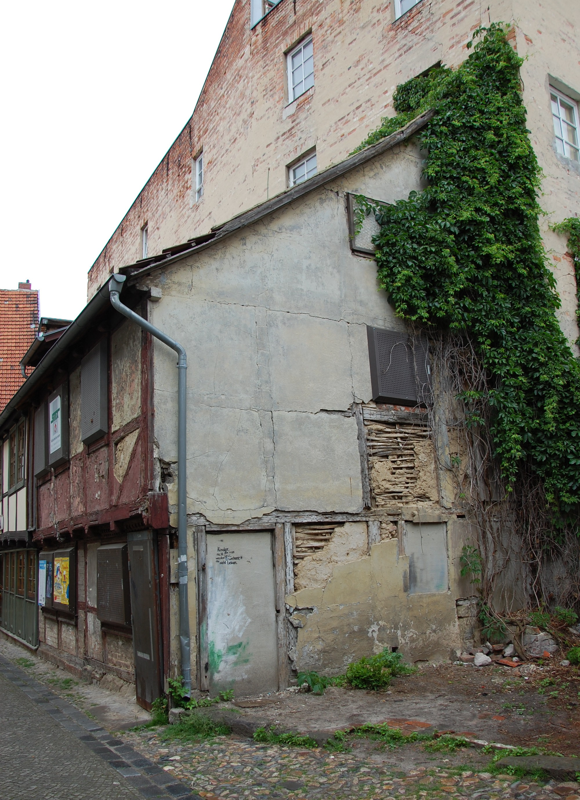 Haus Schuhhof 1 in Quedlinburg, Ostseite